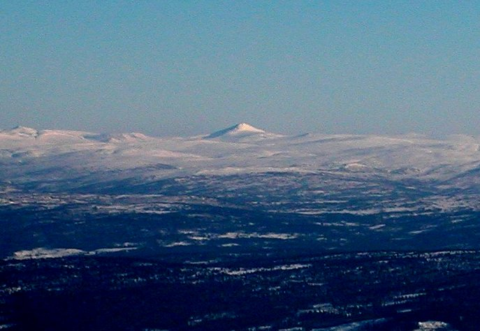 Forollhogna (image center) as seen from Ilfjellet, Sør-Trøndelag, Norway.